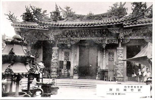 日治時期的新竹城隍廟